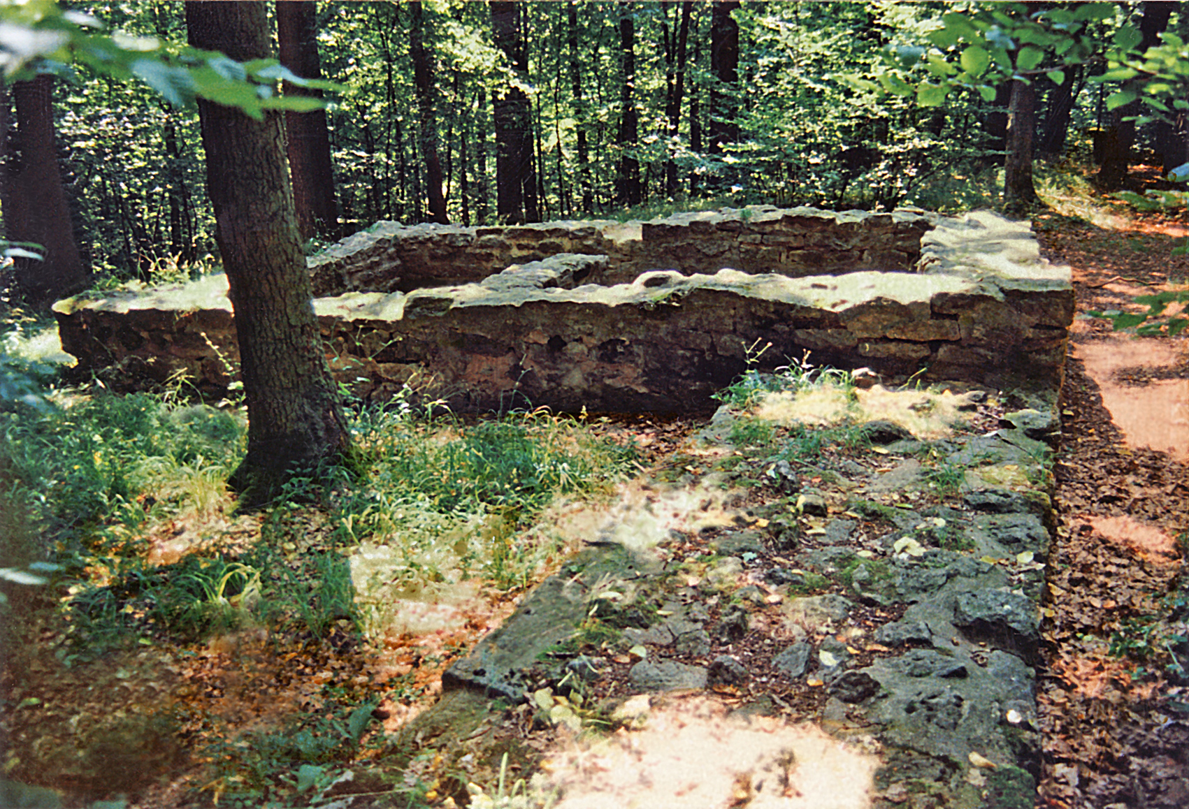 Der Limeswachturm Wp 14/4 am Rätischen Limes in Bayern. Zustand im Juli 1997.